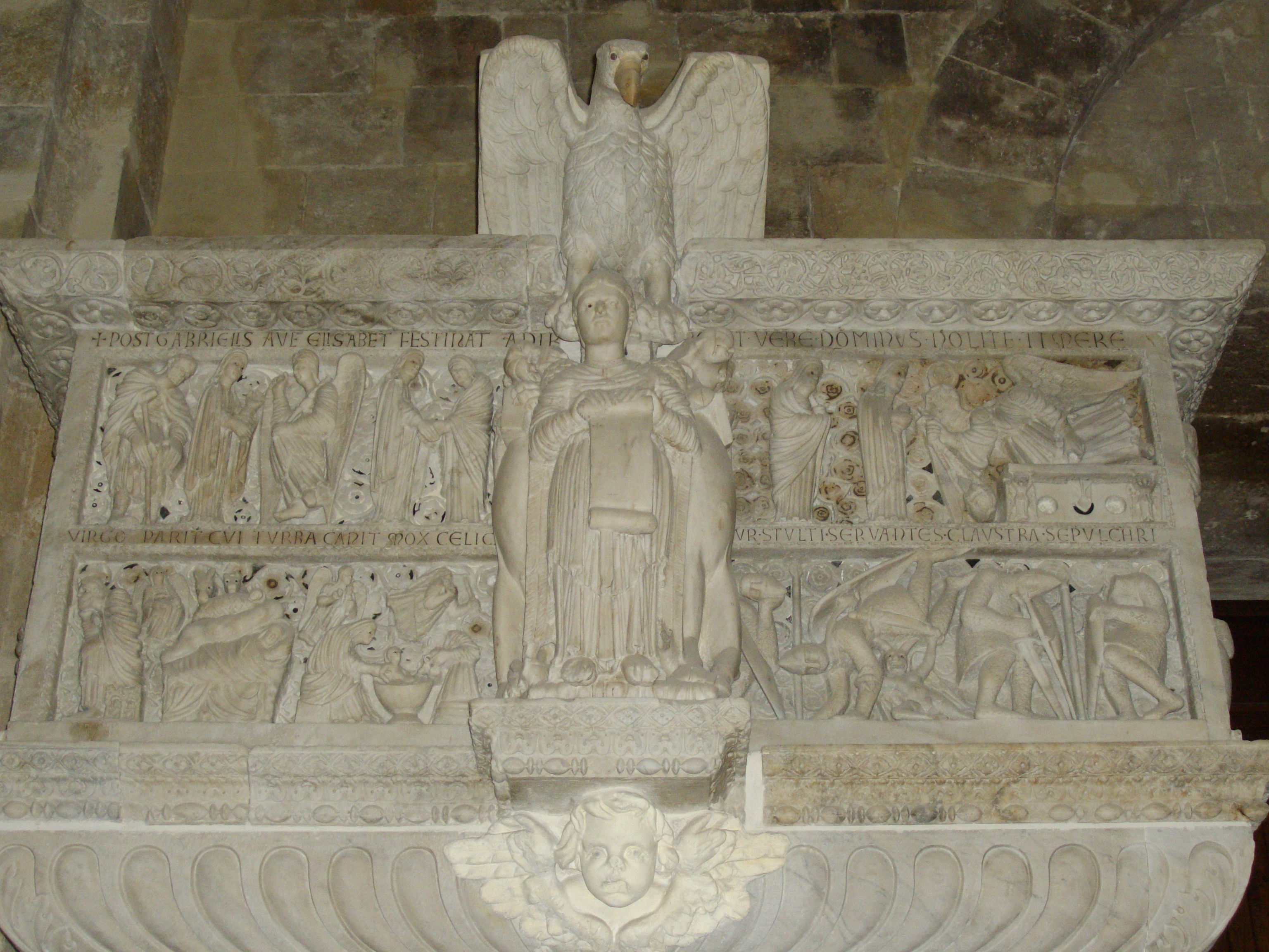 Pulpito di maestro Guglielmo (XII secolo), Duomo di Cagliari